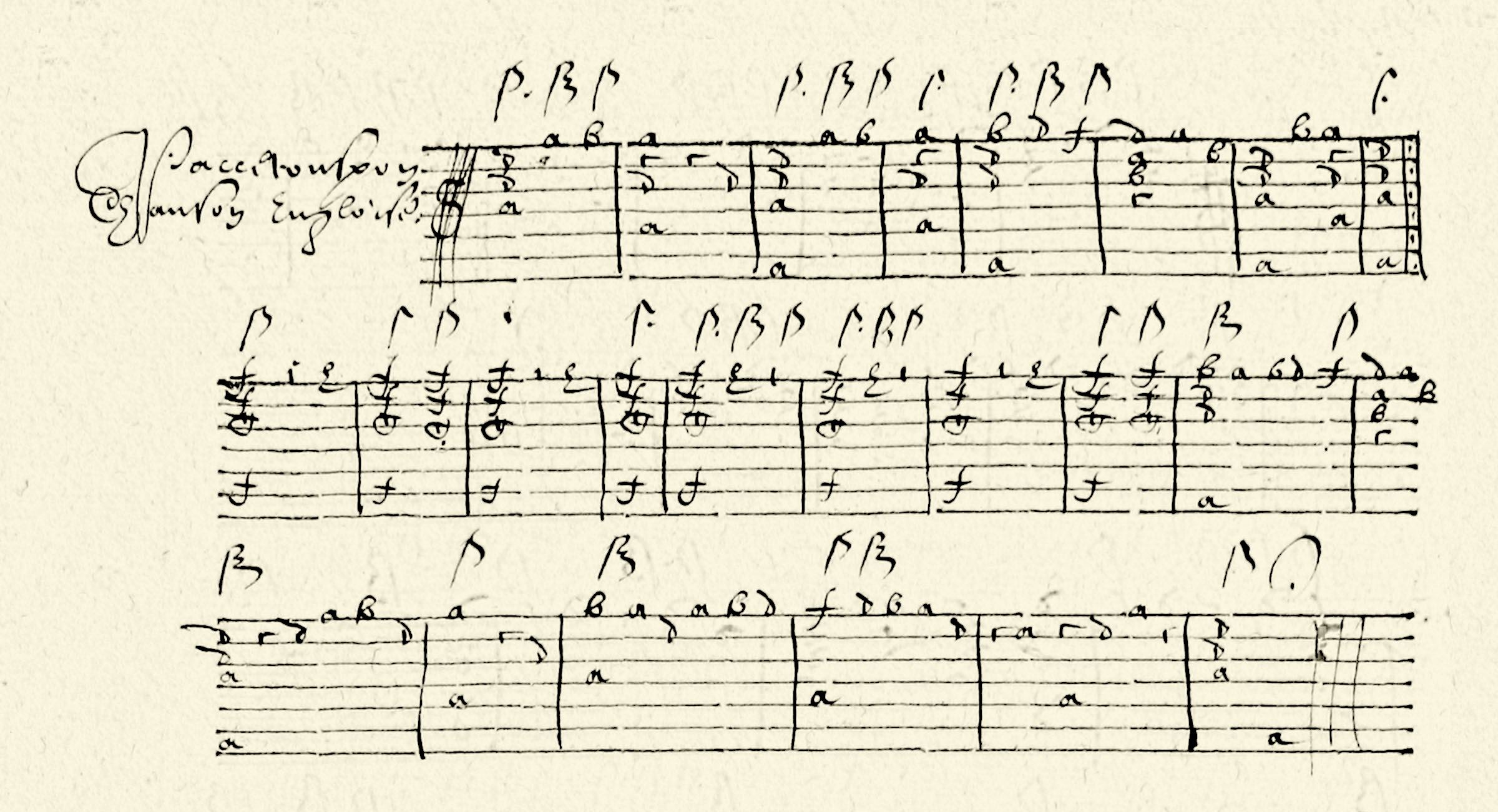 Engelse dans op pag. 401 verso van Het Luitboek van Thysius